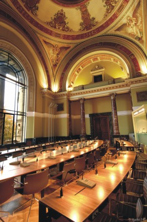 Sala konferencyjna CCR w Strasbourgu